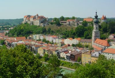 Burghausen: Stadtansicht vom österreichischen Salzachufer